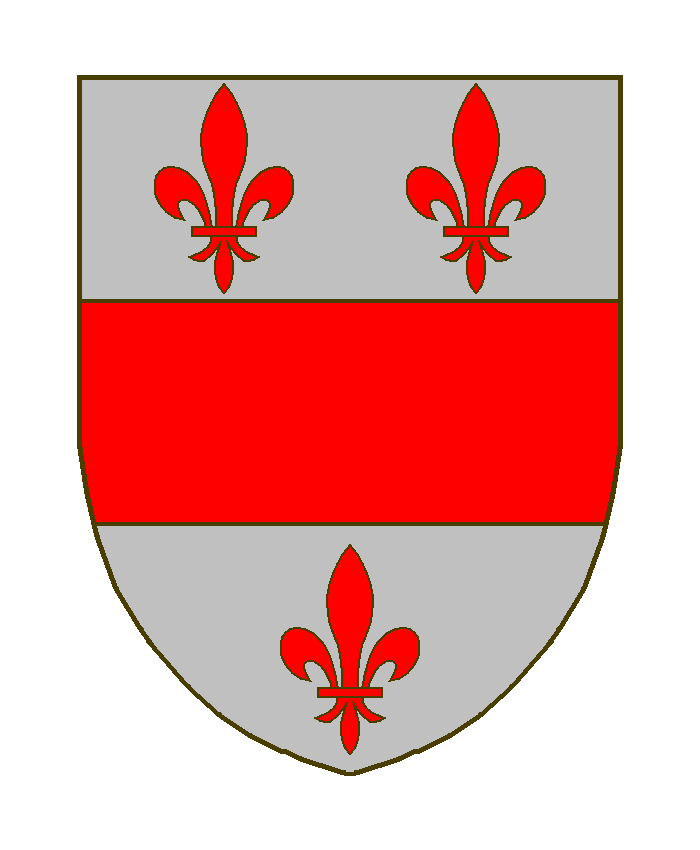 Wappen der pfälzischen Adelsfamilie von Randeck